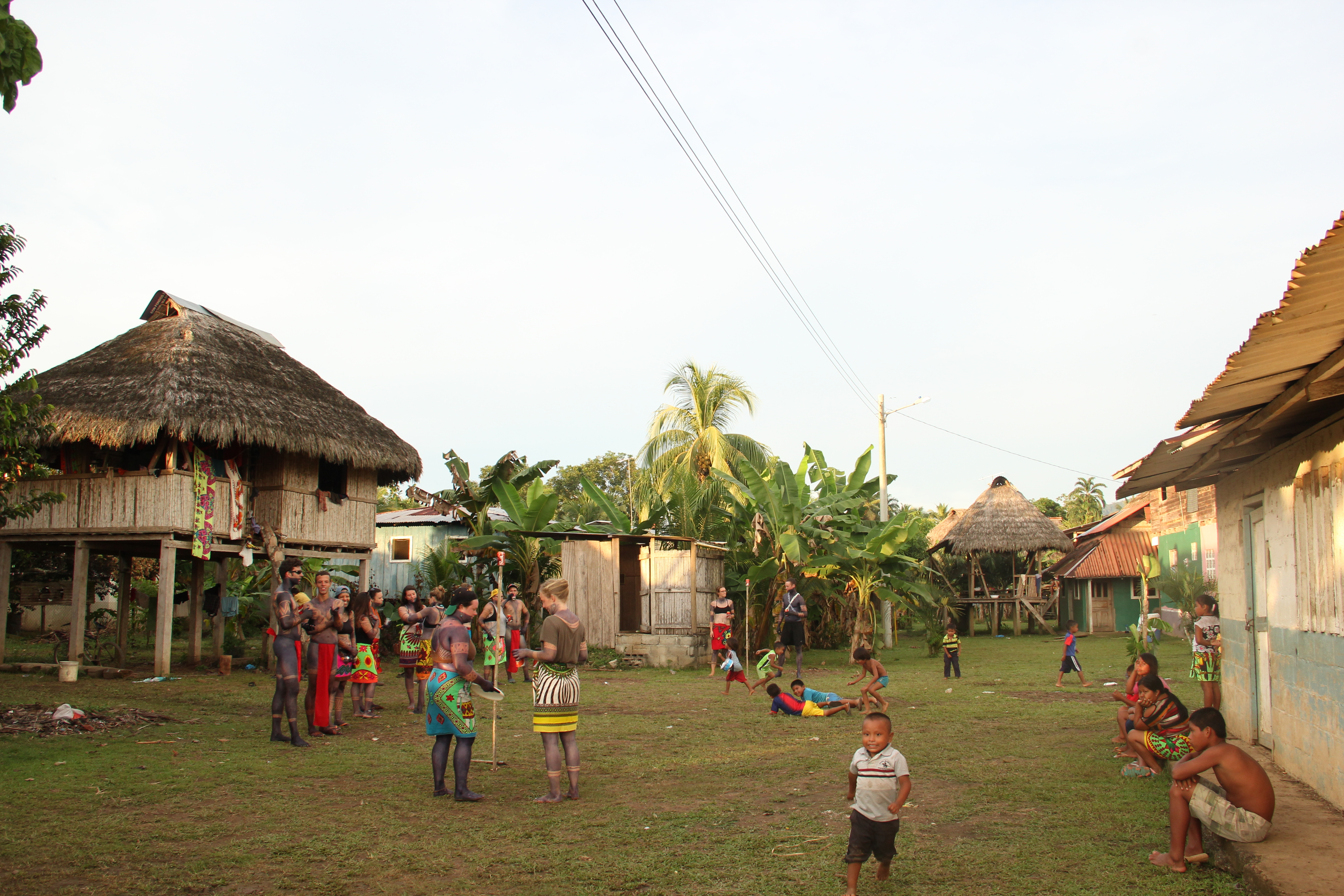 Puerto Indio, provincia de Daríen, República de Panamá.